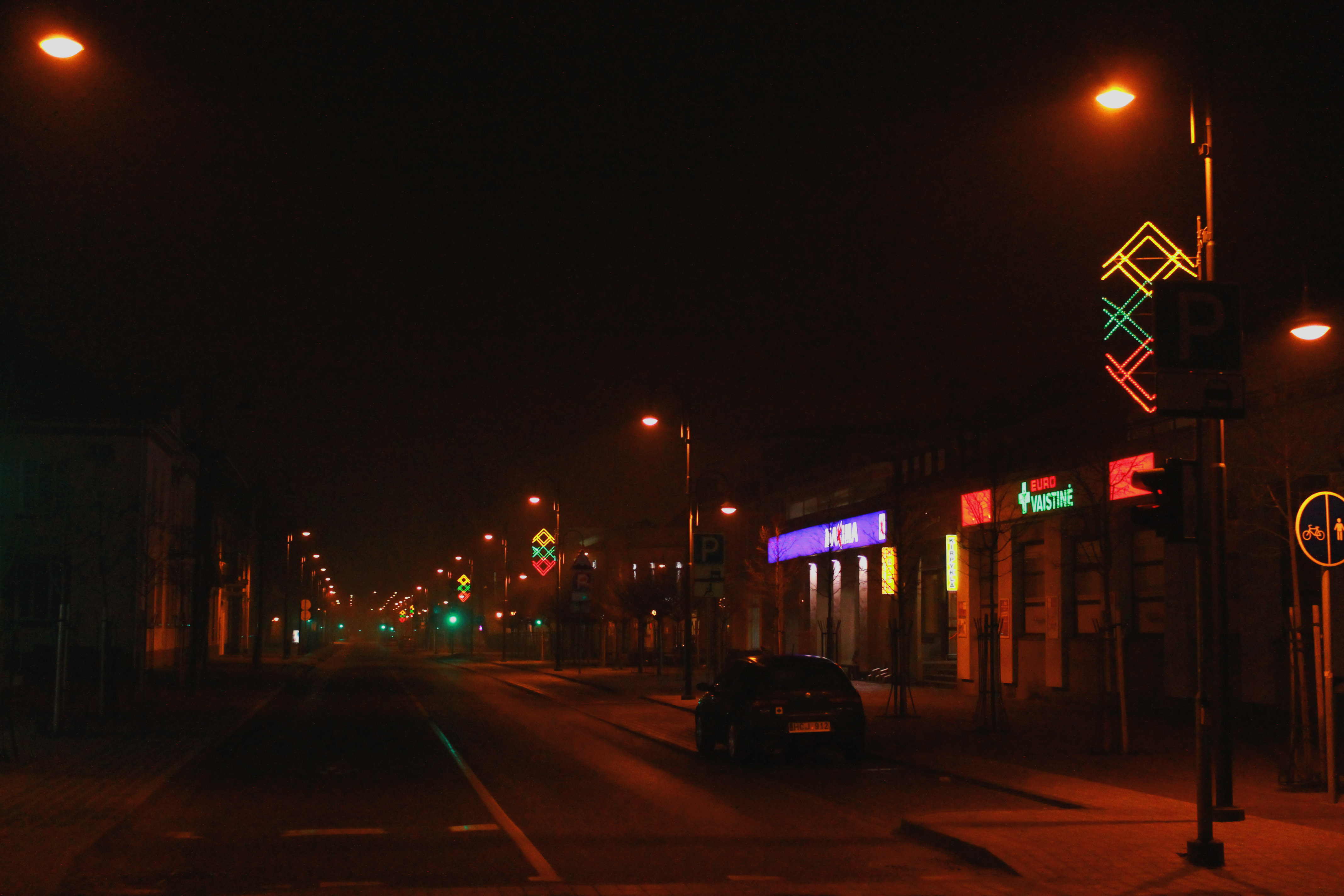 Laisvės gatvė naktį